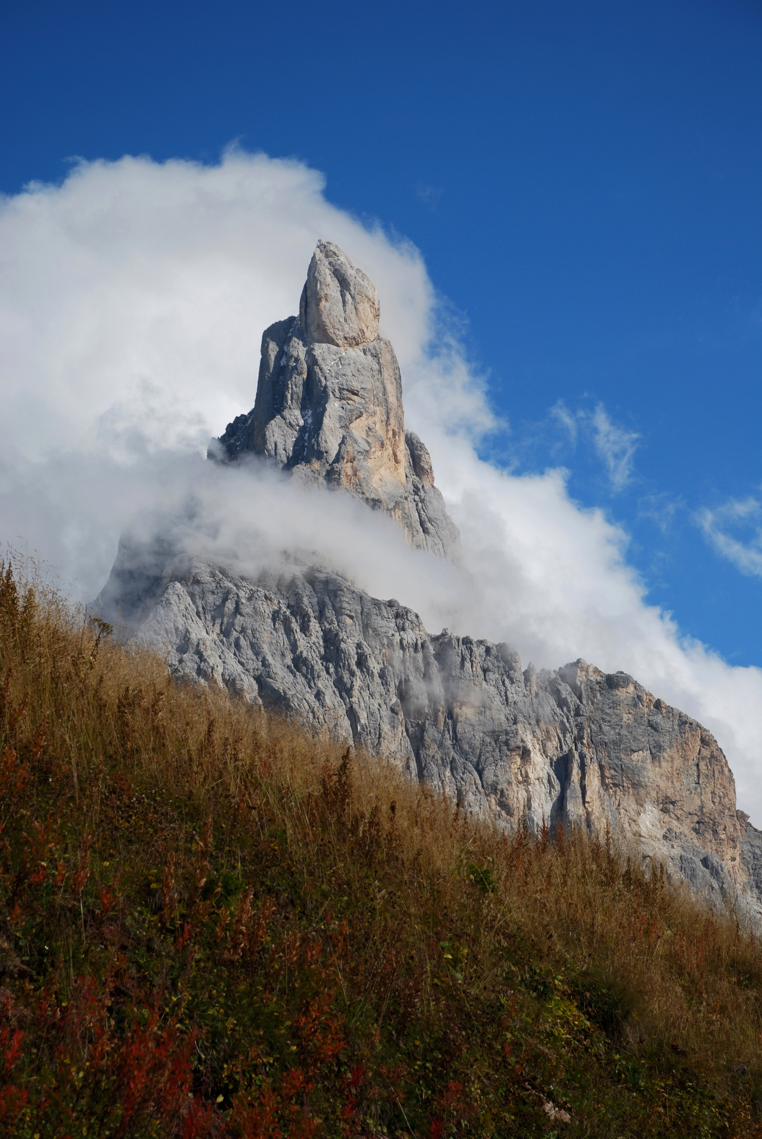 Parco naturale Paneveggio - Pale di San Martino (Q267909)